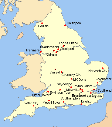 Répartition des clubs en League One 2009-2010.